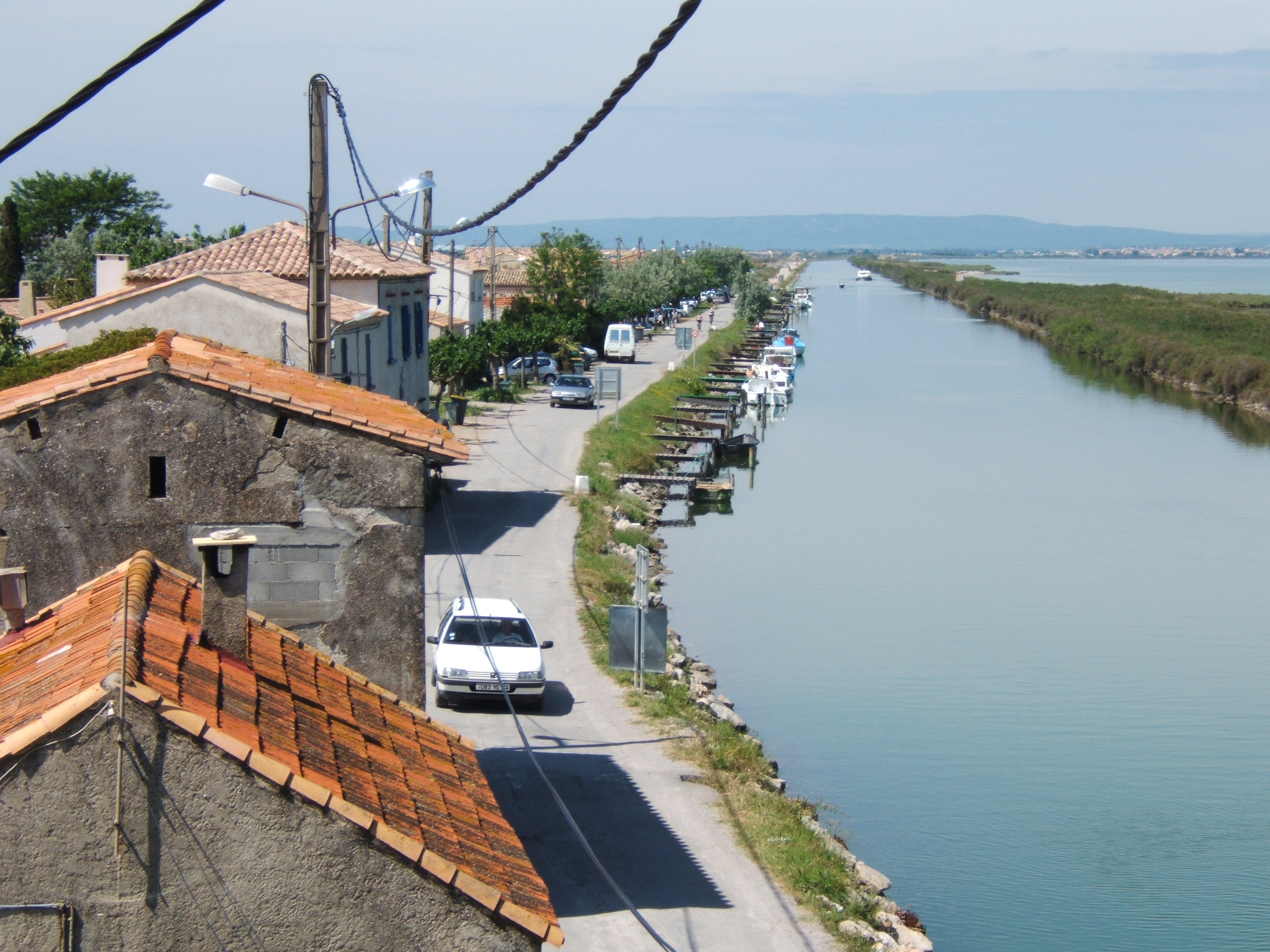 Het kanaal van Rhone naar Sète